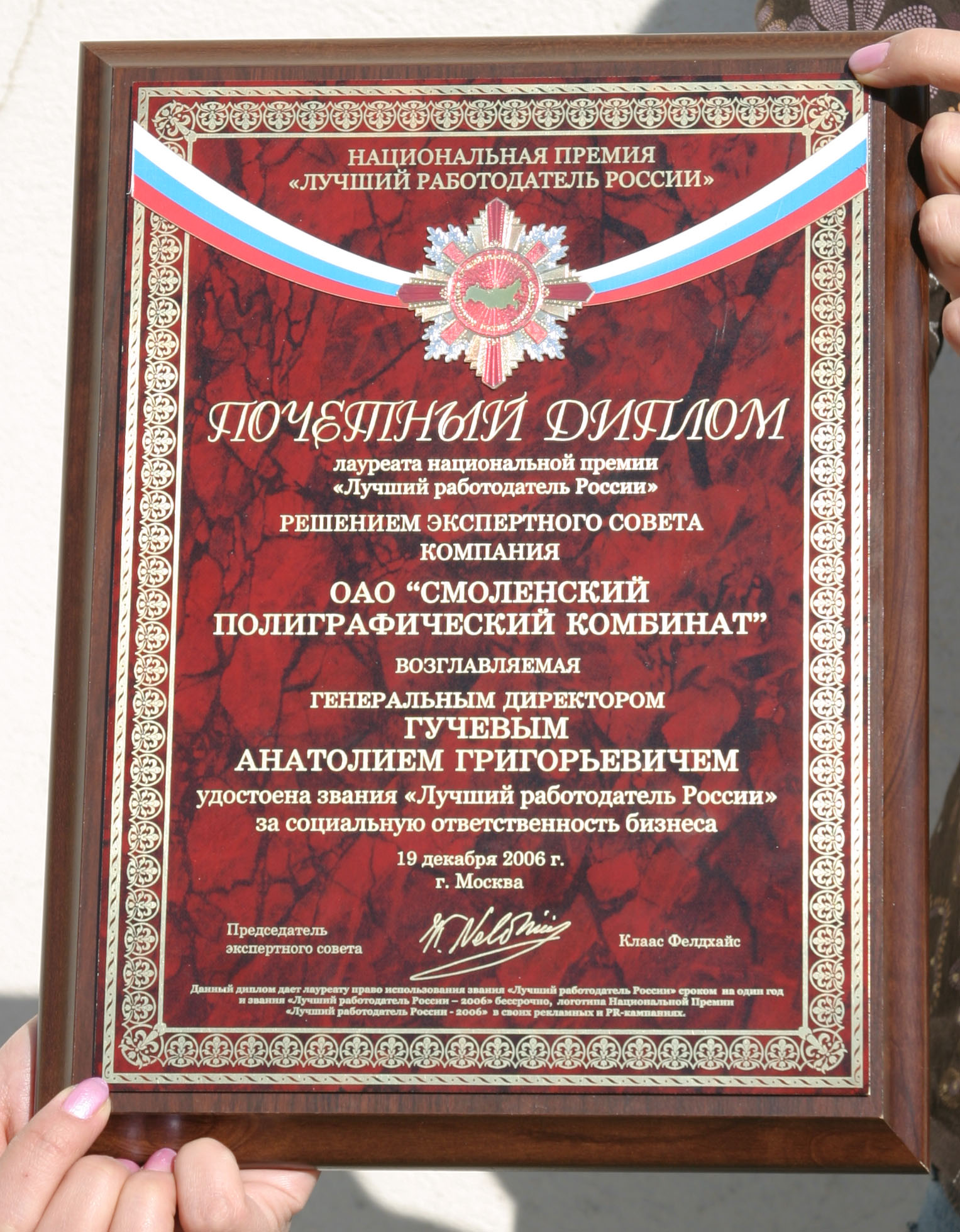 Плакетка с лазерной гравировкой